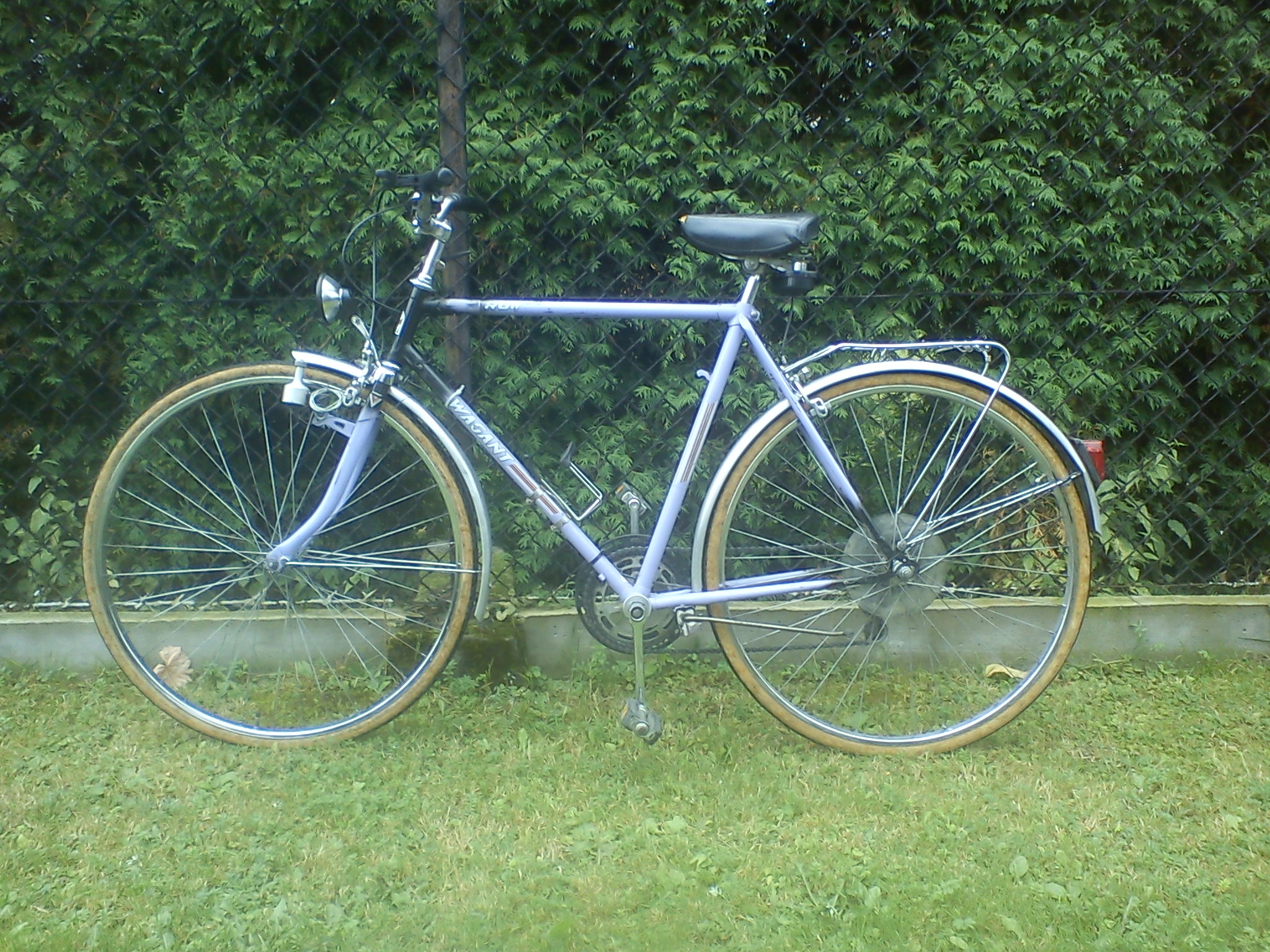 Romet Wagant